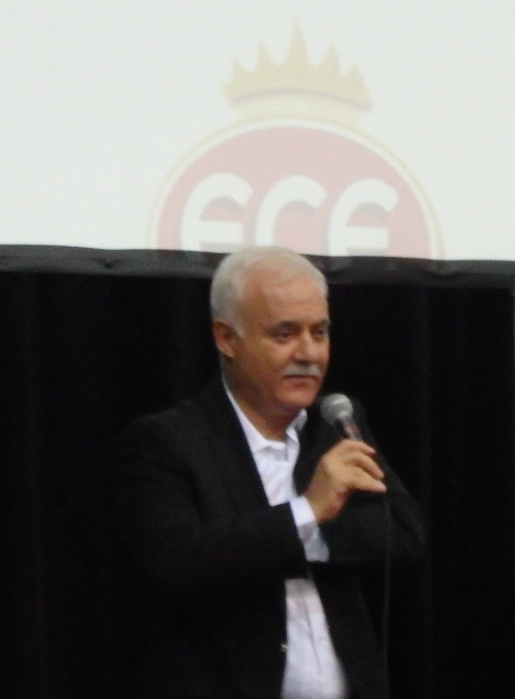 Nihat Hatipoglu, Viyana 20.09.2014 OLYMPUS DIGITAL CAMERA